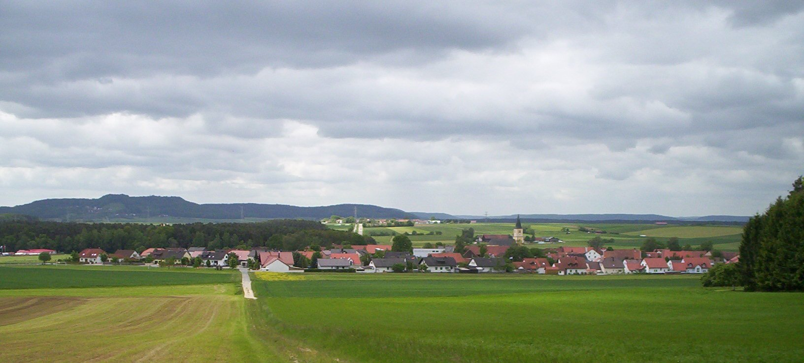 Ostansicht von Reichertshofen